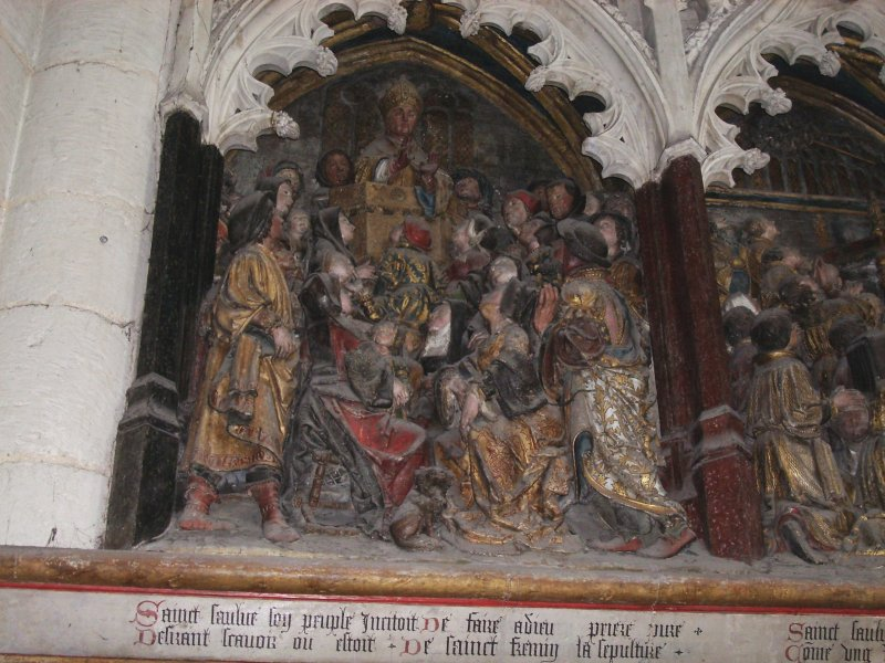 Bas relief relatant la vie de Saint Firmin dans la cathédrale d'Amiens - Partie centrale